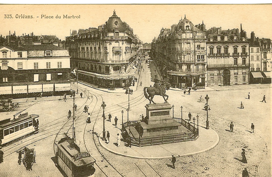 Place du Martroi, Orléans, Loiret, France